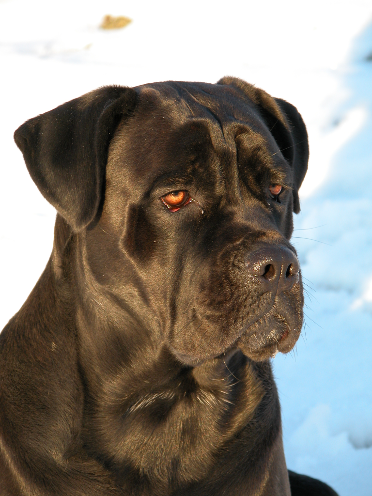 Cane corso femmina di nome Temi con orecchie integre